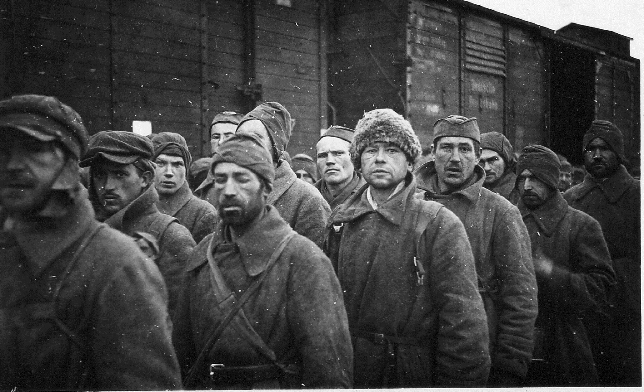 Sowjetische Kriegsgefangene aus dem Stalag II A bei der Ankunft und Verteilung zu den Arbeitsorten